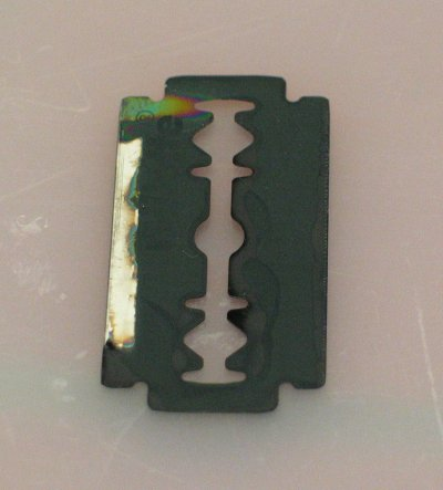 Rasierklinge mit Polypyrrol beschichtet. Aufnahme aus dem Chemieunterricht.